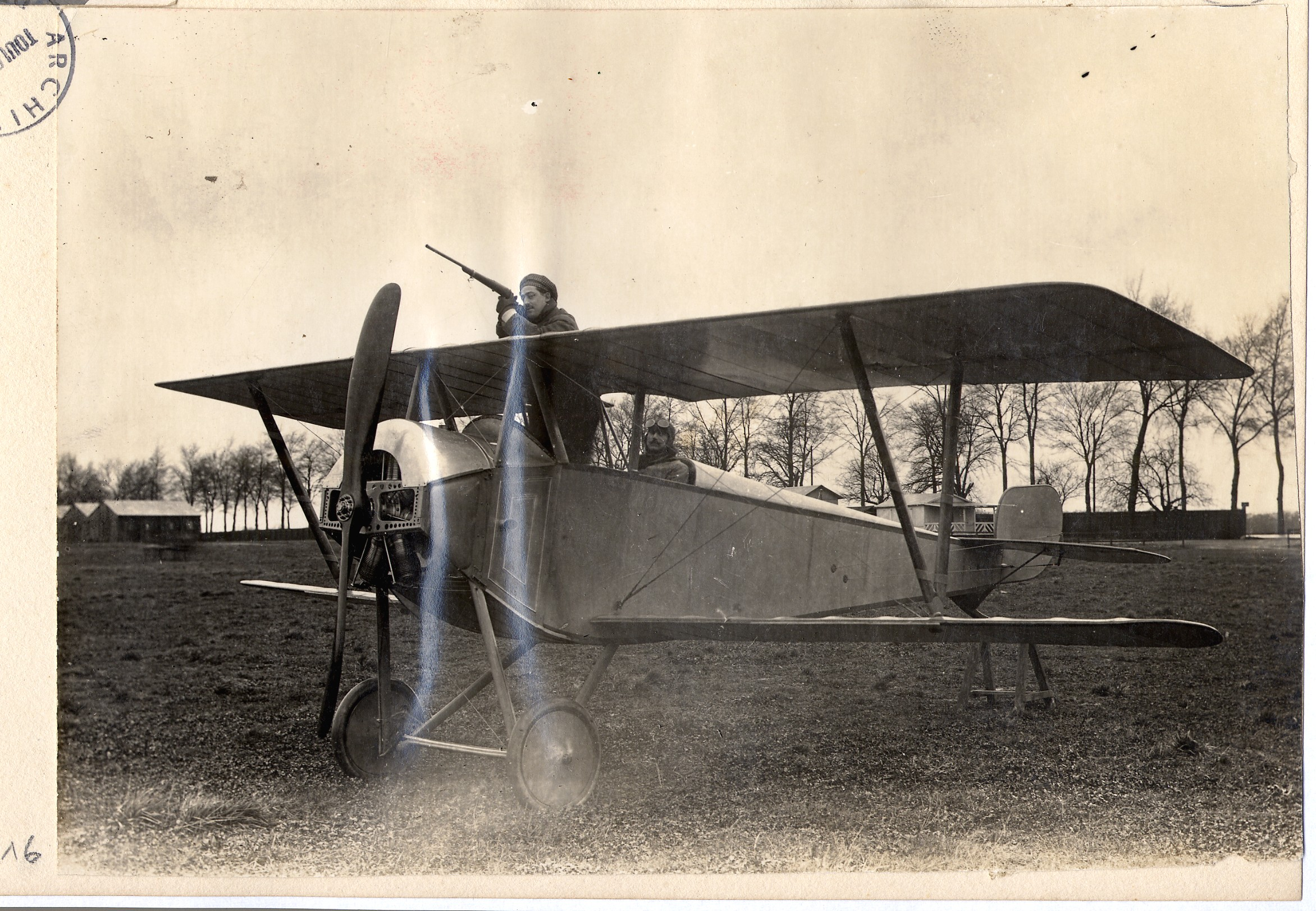 Biplan au sol à l'arrêt, de trois quart face, avec deux hommes à bord qui posent. l'un deux faisant semblant de viser avec un fusil. 1915. Guerre 1914-1918.